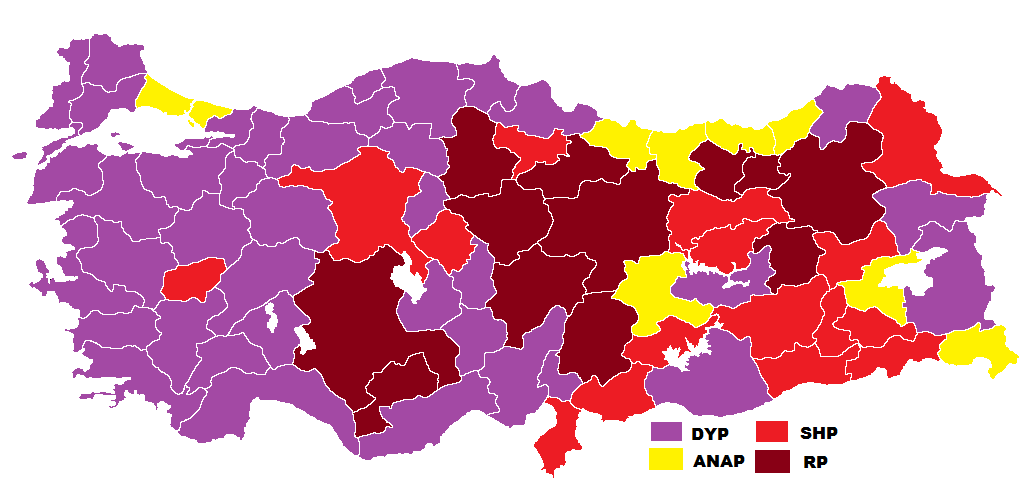 1991 genel seçimleri sonucunun Türkiye haritasında gösterimi.